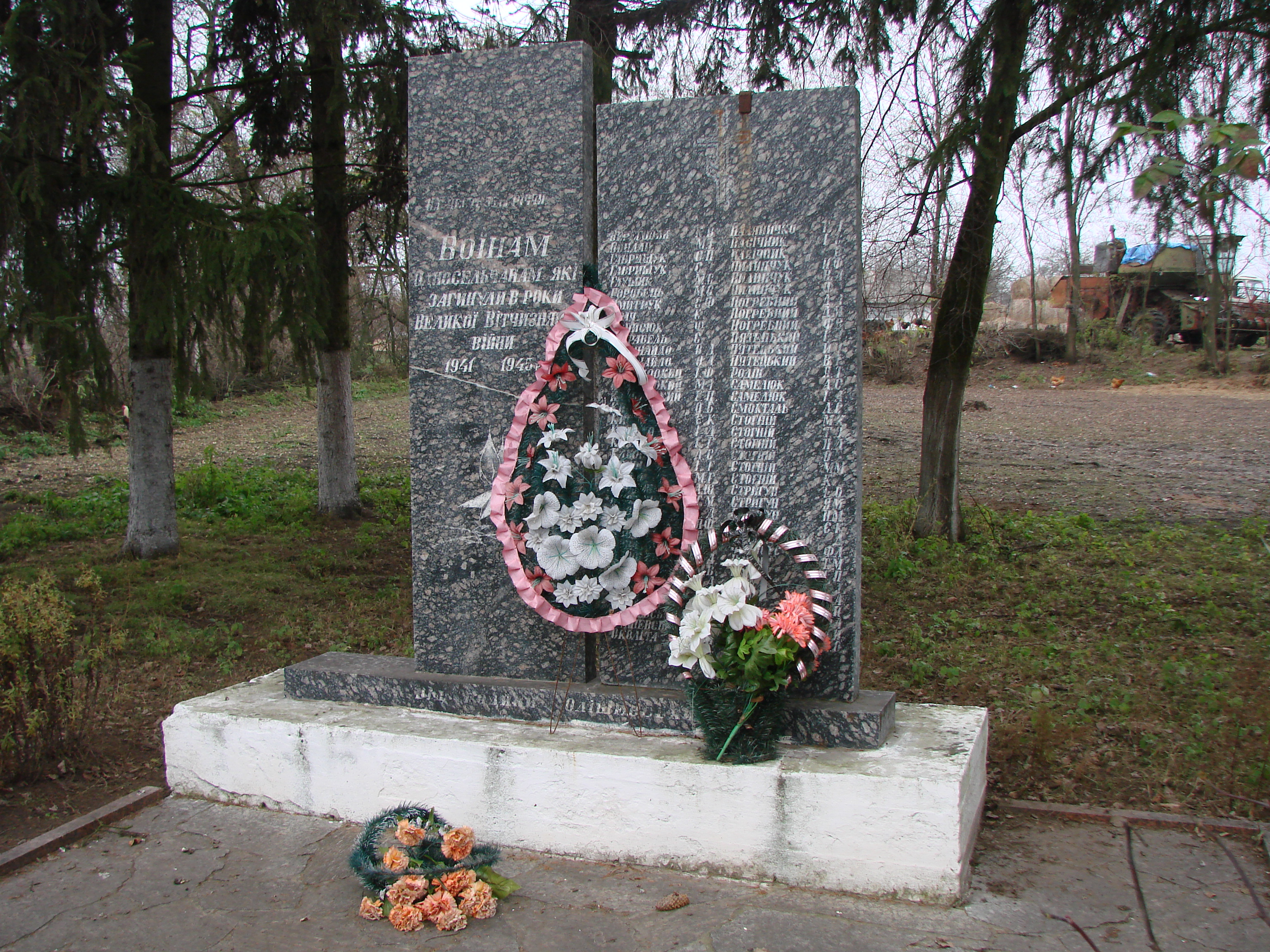 Пам'ятник воїнам-односельцям, які загинули в роки Великої Вітчизняної війни, село Селезенівка, біля будинку культури